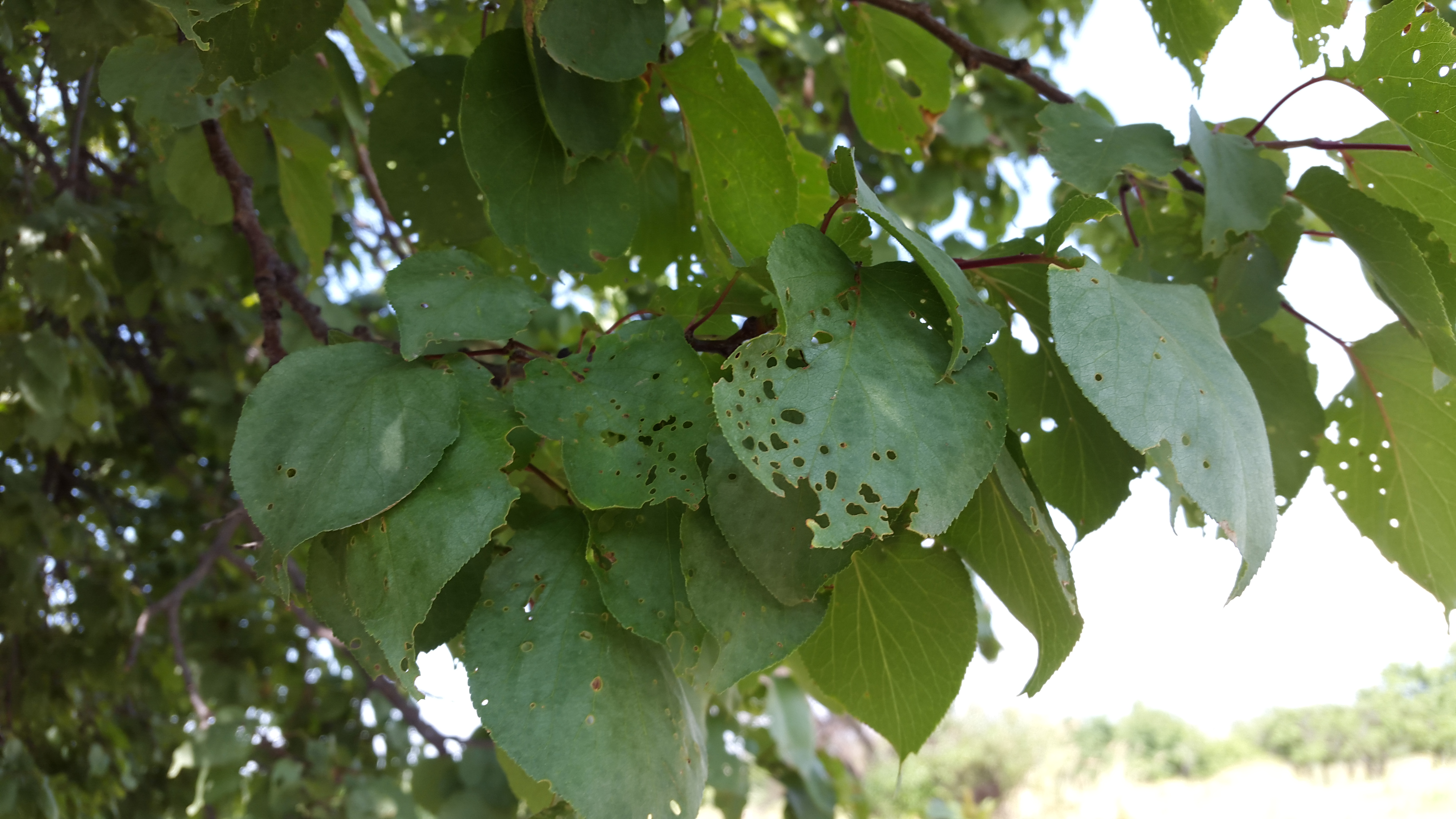 Клястероспориоз (болезнь) листьев абрикоса